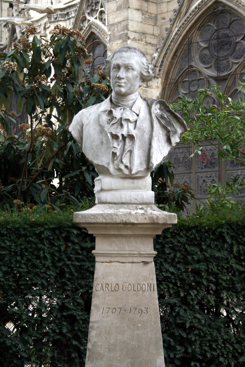 Buste de Carlo Goldoni par Édouard Fortini, square Jean-XXIII, Paris 4e.